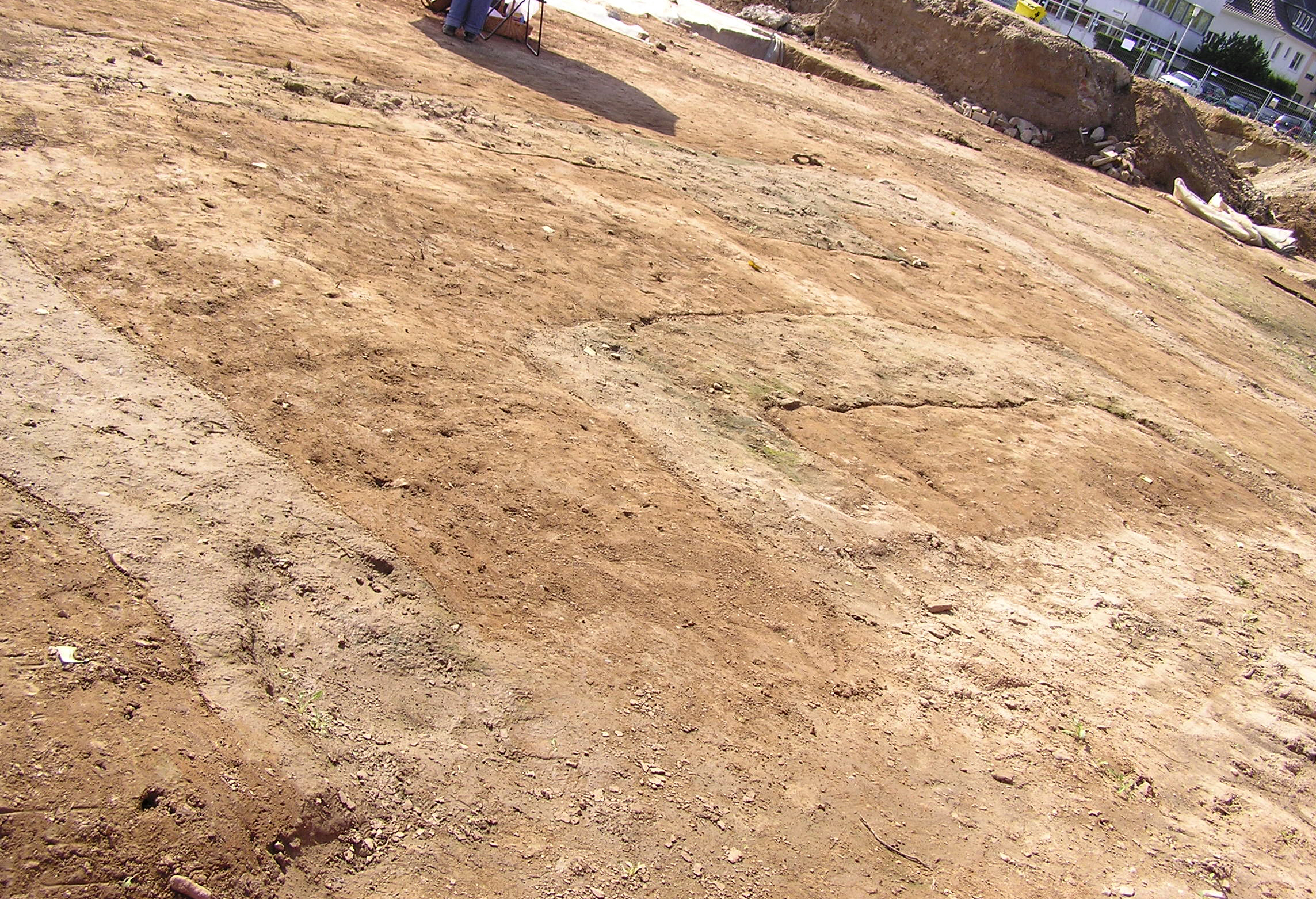 Ausbruchgräben des gallo-römischen Umgangstempel des vicus bonnensis (zivile römische Siedlung in Bonn). Mehr ist nicht mehr vom quadratischen, 10 x 10 m großen Tempel erhalten geblieben.